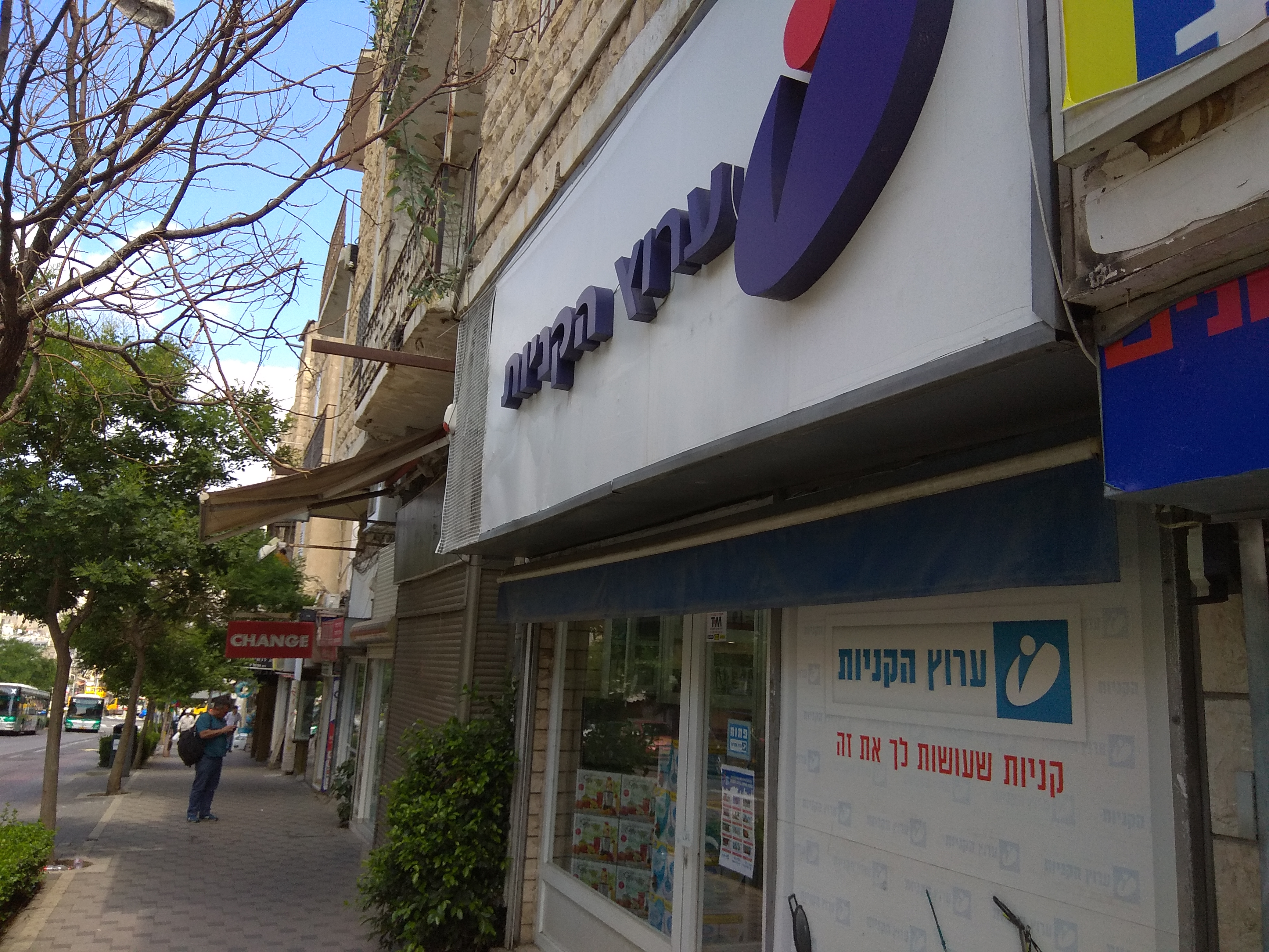 חנות של ערוץ הקניות בחיפה